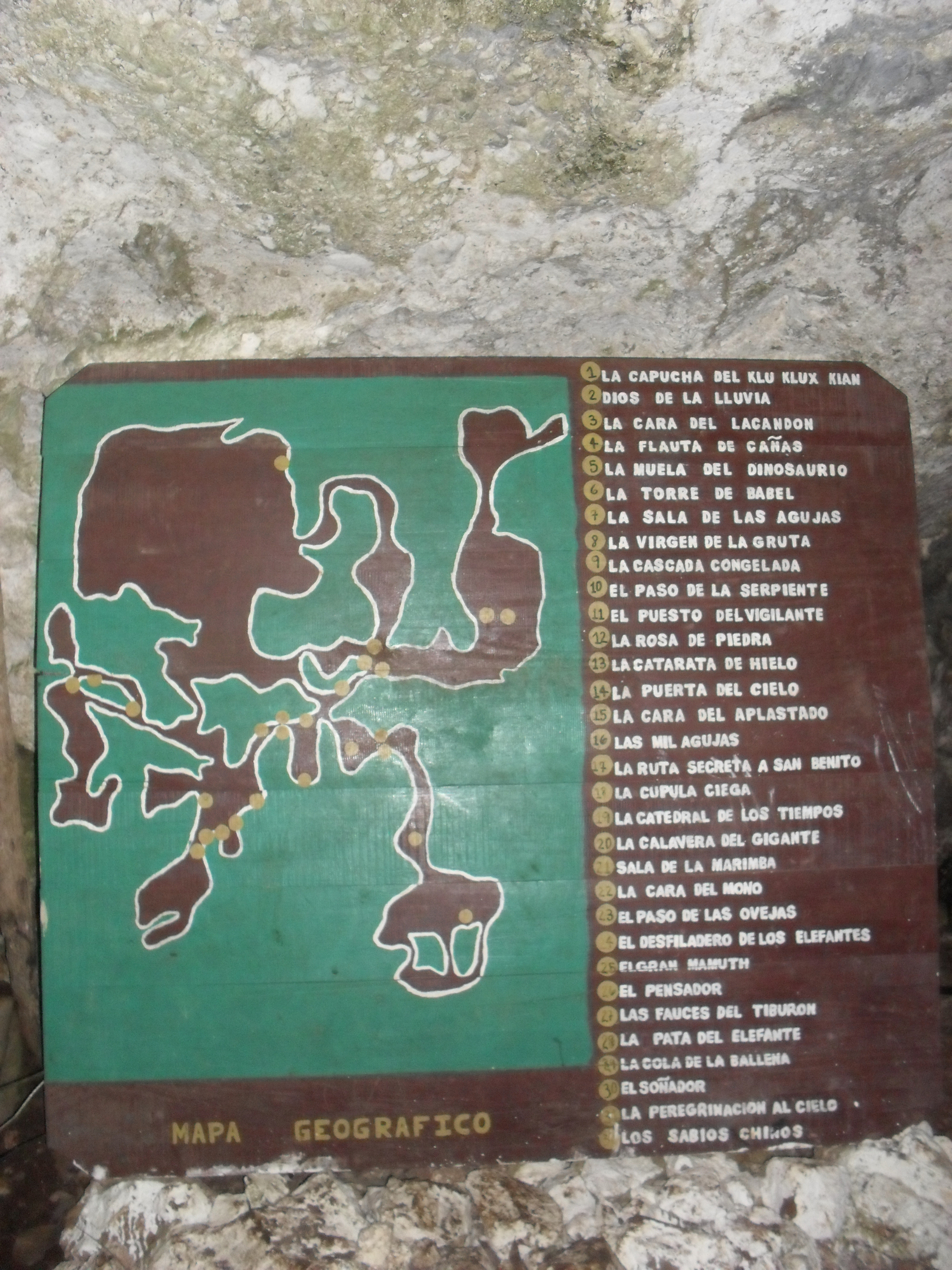 El mapa de las Cuevas de Actùn Kan, su formación.